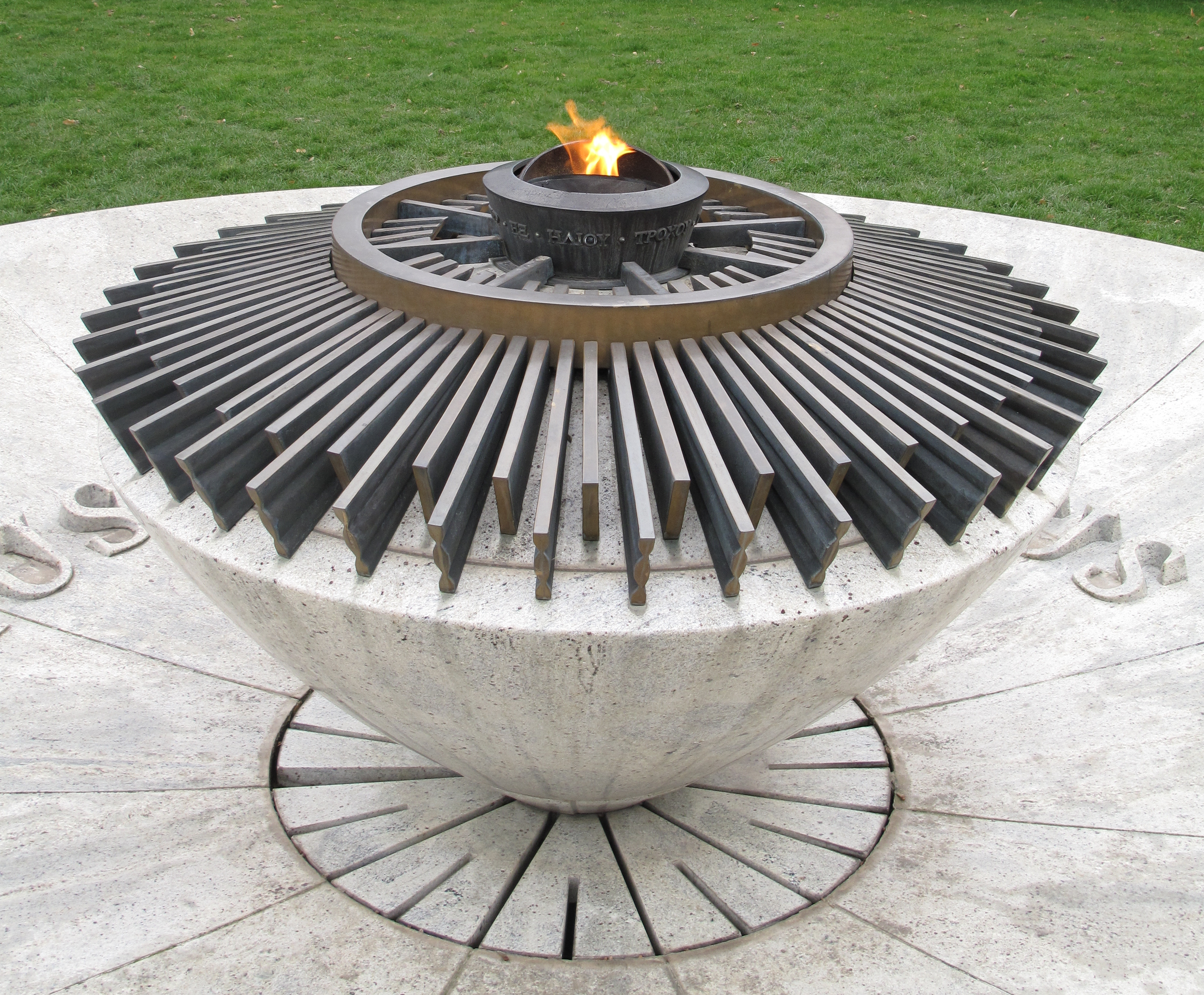 Олимпийский огонь в Лозанне